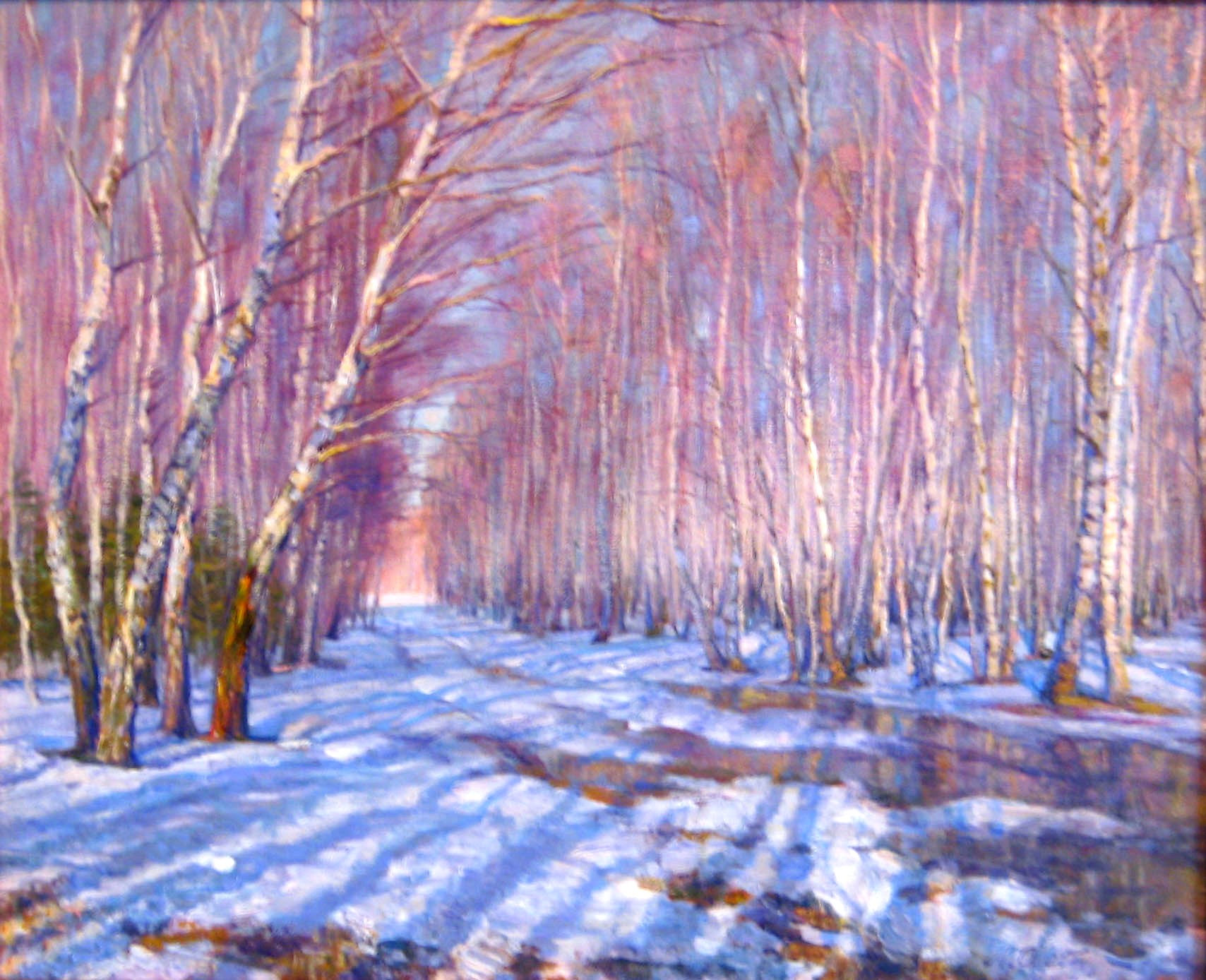 Картина Остапенко Л.П.